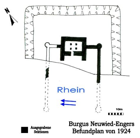 Ländeburgus Neuwied-Engers (D), Befundskizze von 1924.